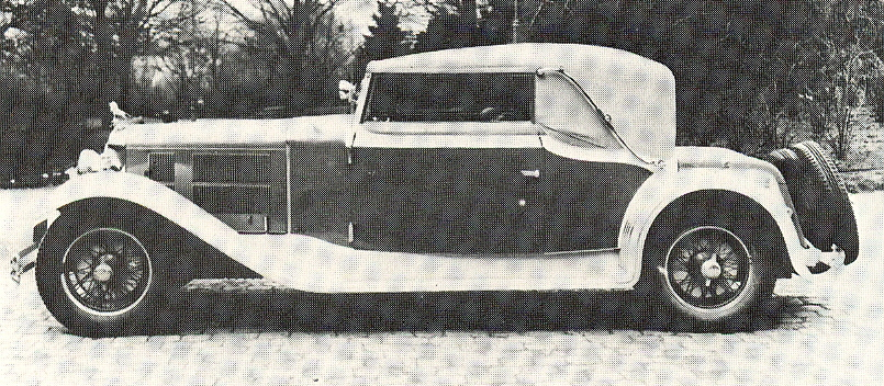 Gräf & Stift SP 5 Sports Convertible (1931)